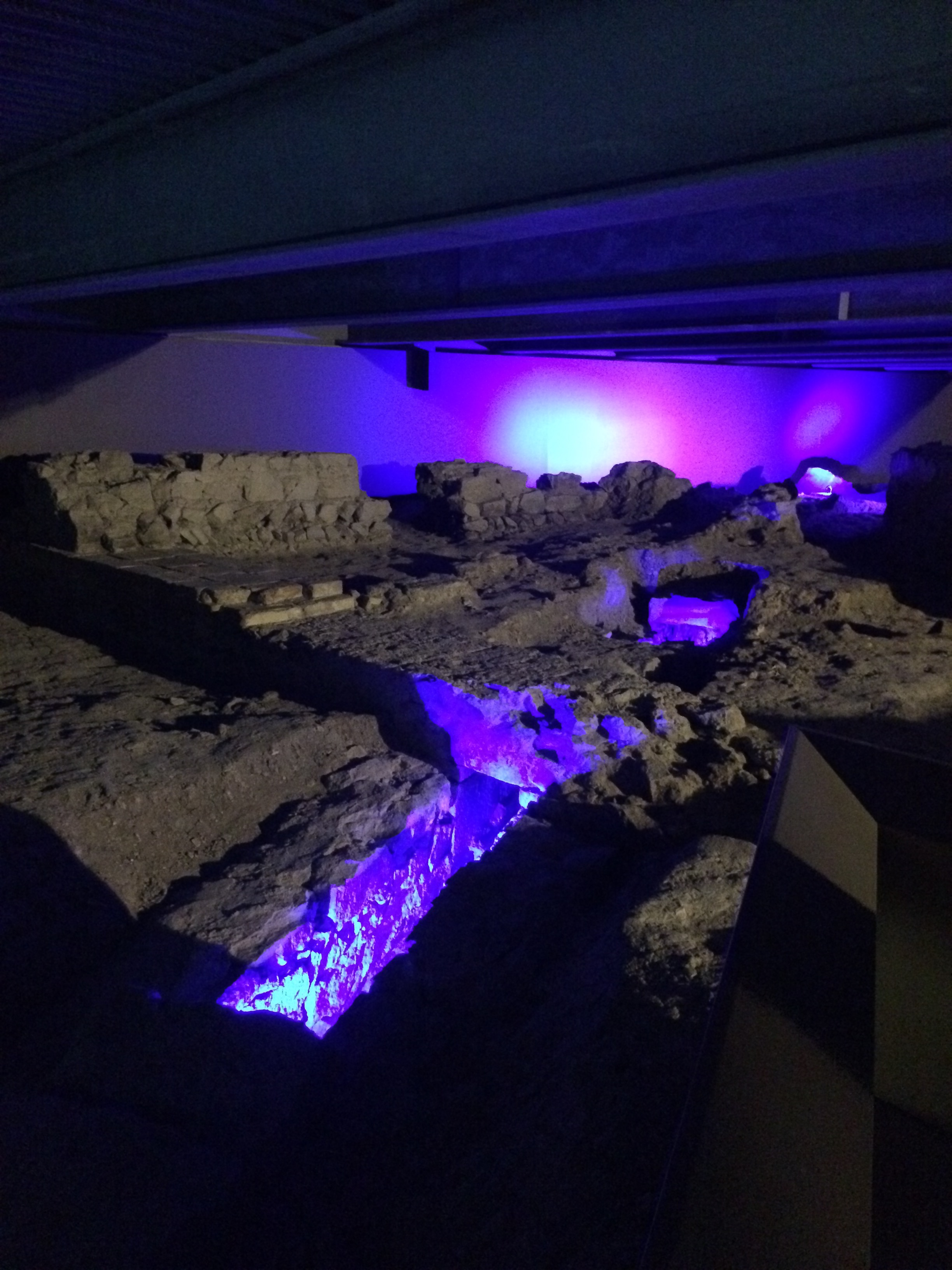 Illuminazione architettura del sistema di canalizzazione delle terme di via Neroniana